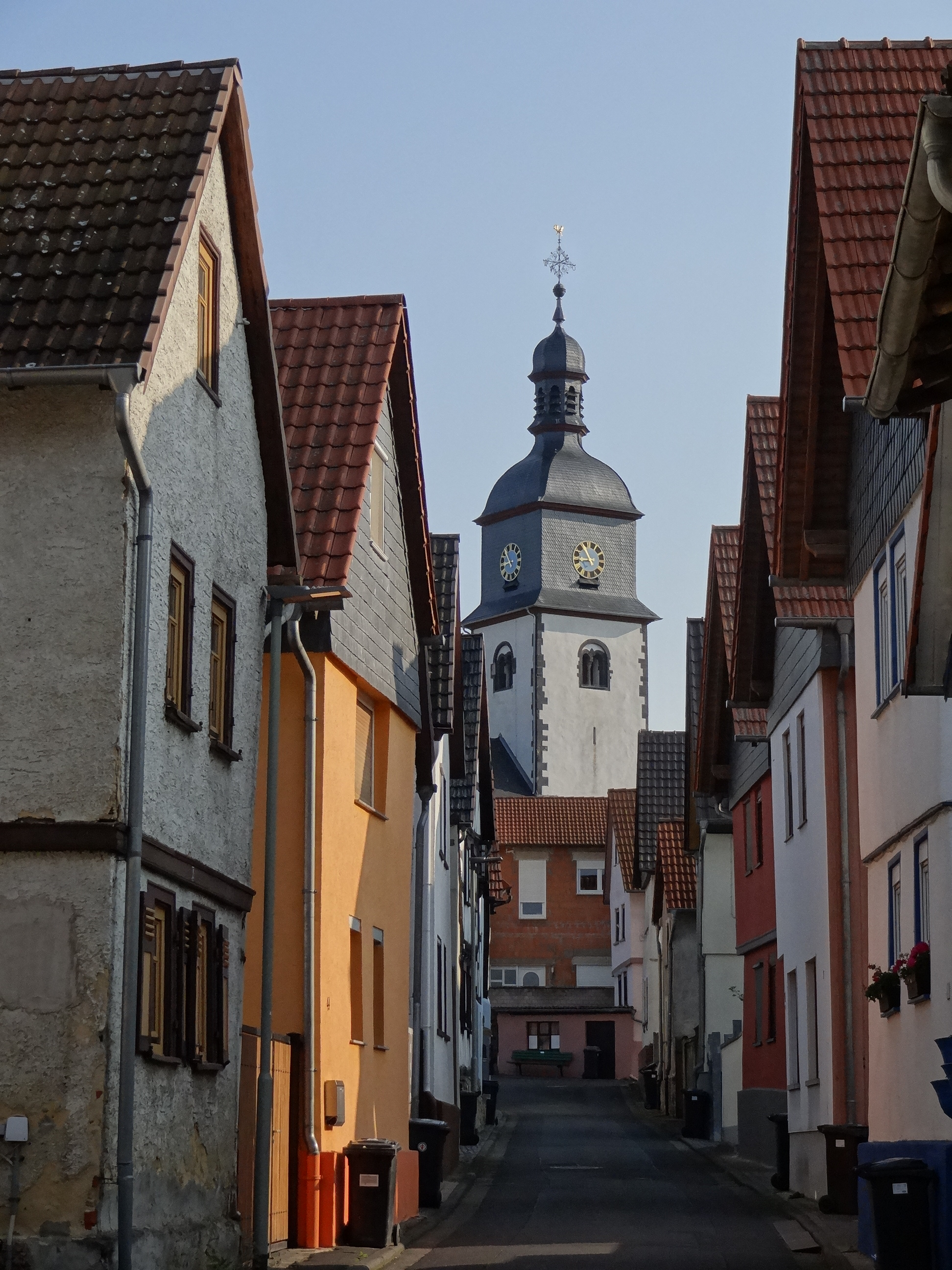 Gesamtanlage historischer Ortskern (Muschenheim)